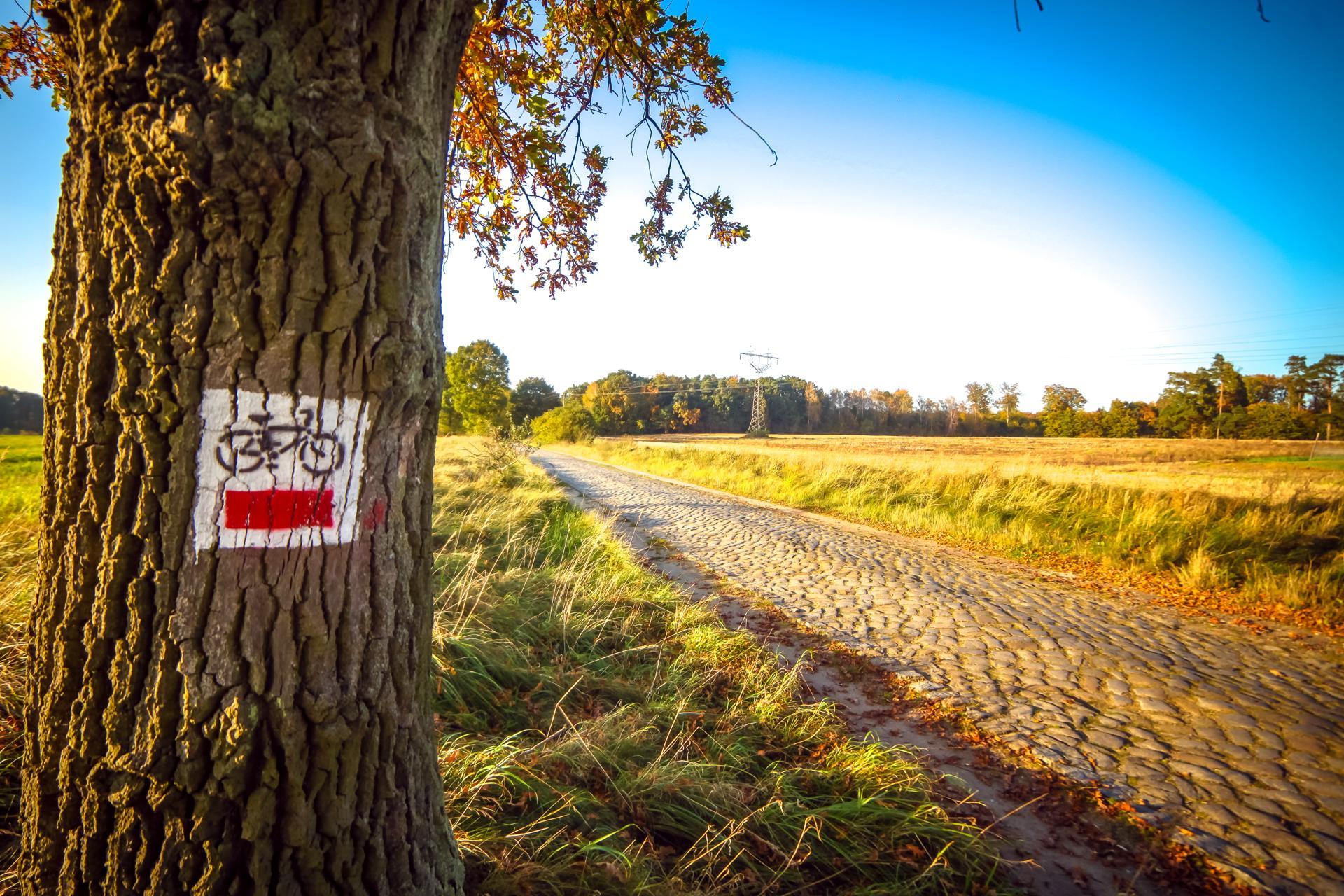 Trasa rowerowa w okolicach Mironic